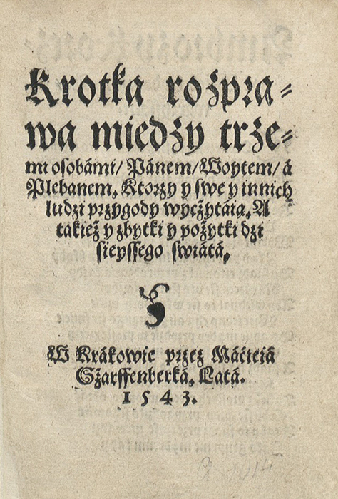 Krótka rozprawa między trzema osobami: panem, wójtem i plebanem